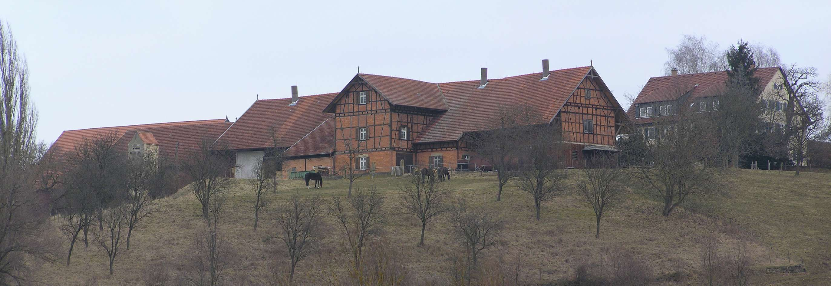 Hofgut Tachenhausen (Gemeinde Oberboihingen, aber im Besitz der Stadt Nürtingen) Panoramabild aus 3 Einzelbildern